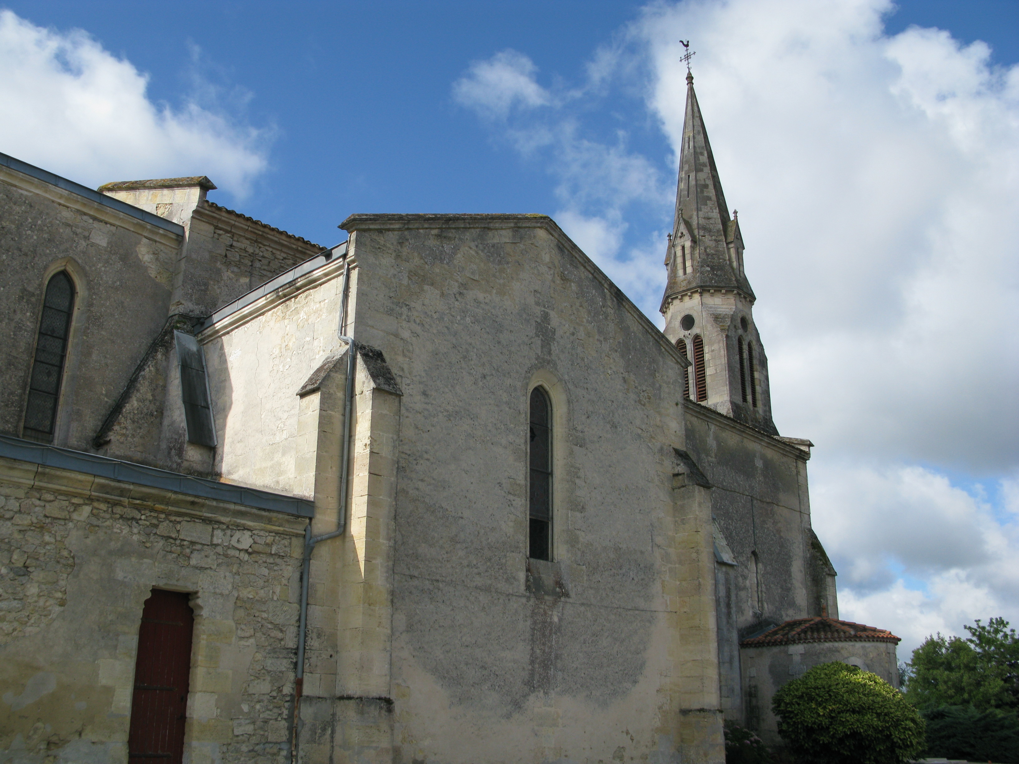 Flanc nord de l'église Saint-Martin d'Arsac (33).